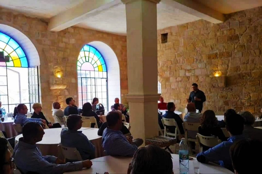 קנר מעביר שיעור בבית המדרש באבו גוש. הקרדיט לצילום: צופית אליצור